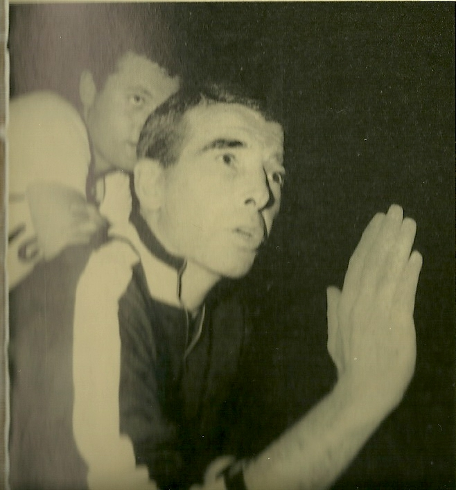 Il cestista ed allenatore di pallacanestro Vittorio Tracuzzi, alle spalle Antonio Bulgheroni